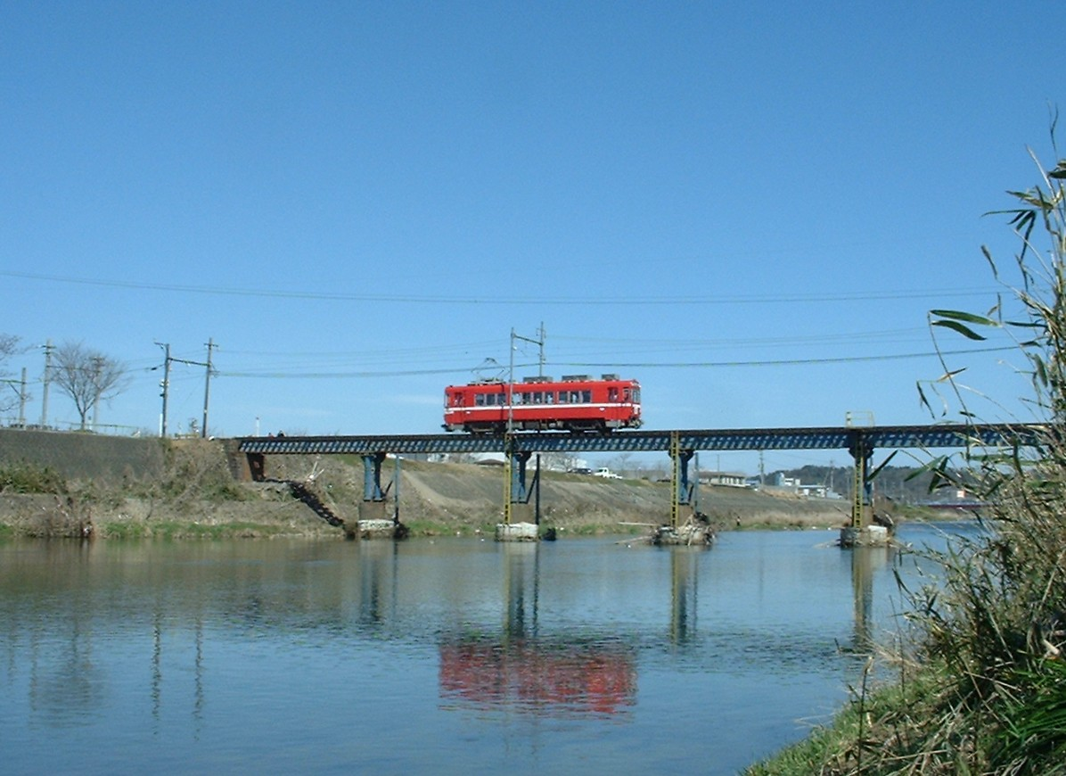 津保川を渡る600形